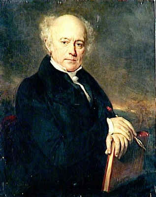 Jacques-Gérard Milbert (1766-1840) , peintre naturaliste